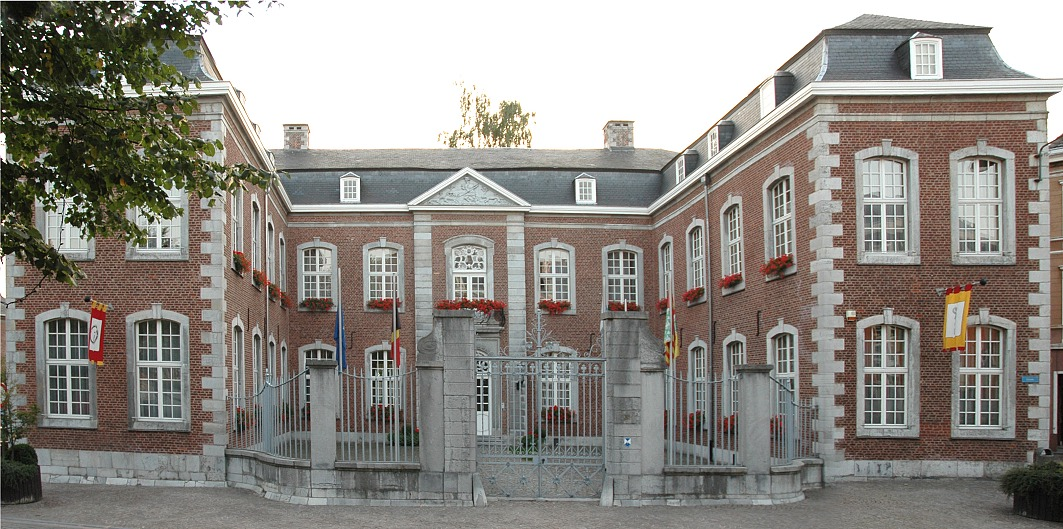 Haus Grand Ry in Eupen, auch „Alte Post“. Architekt vermutlich J.J. Couven. Seit 1984 Regierungssitz der Deutschsprachigen Gemeinschaft in Belgien